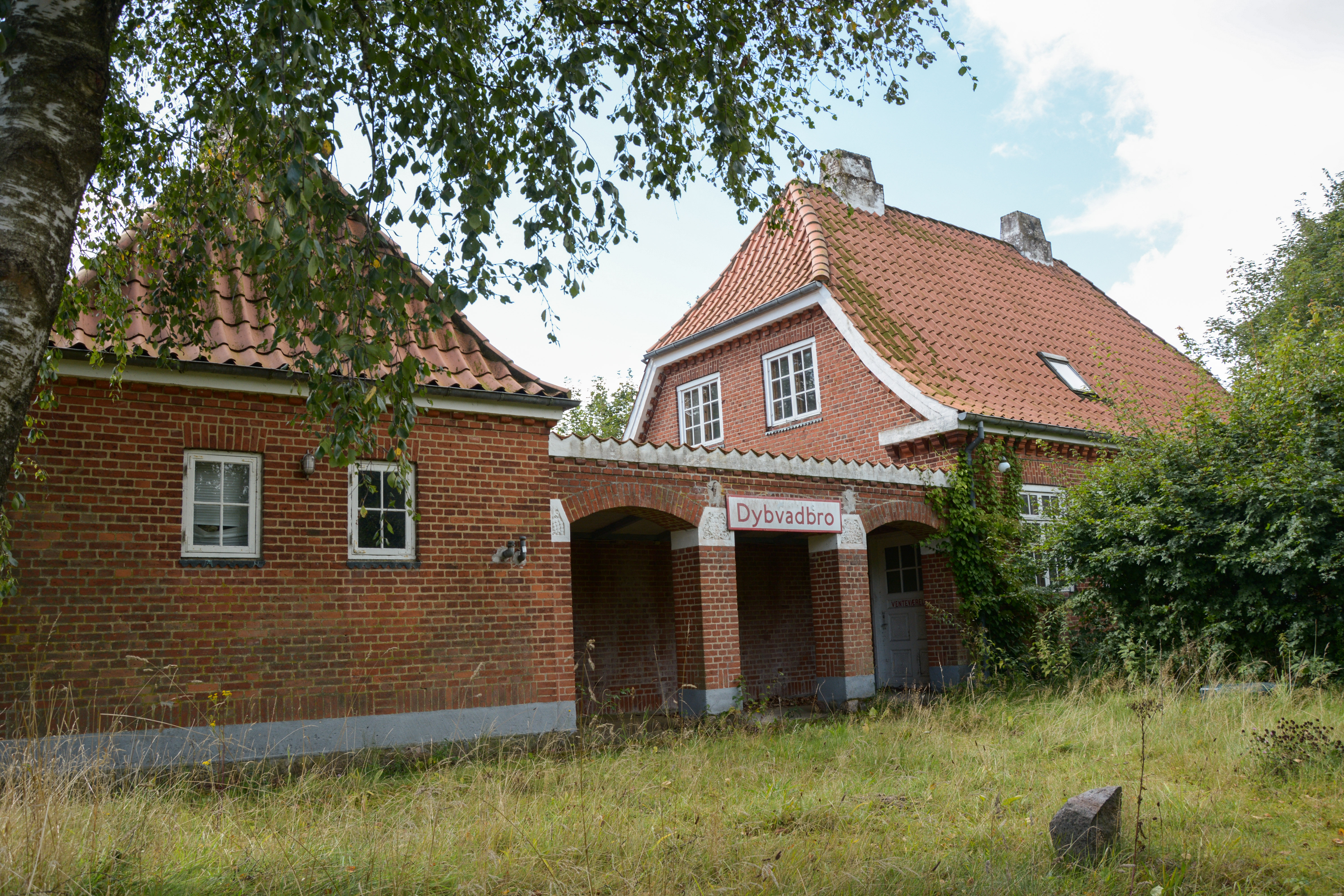 Dybvadbro Station set fra bane siden